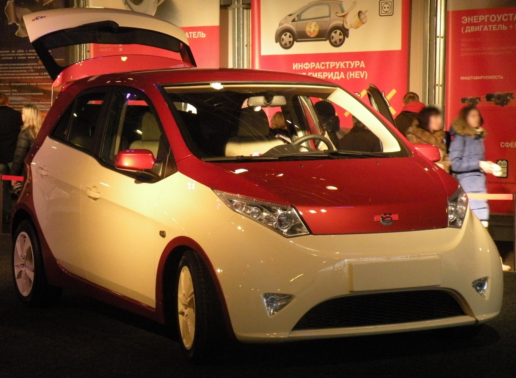 Ё-микровэн